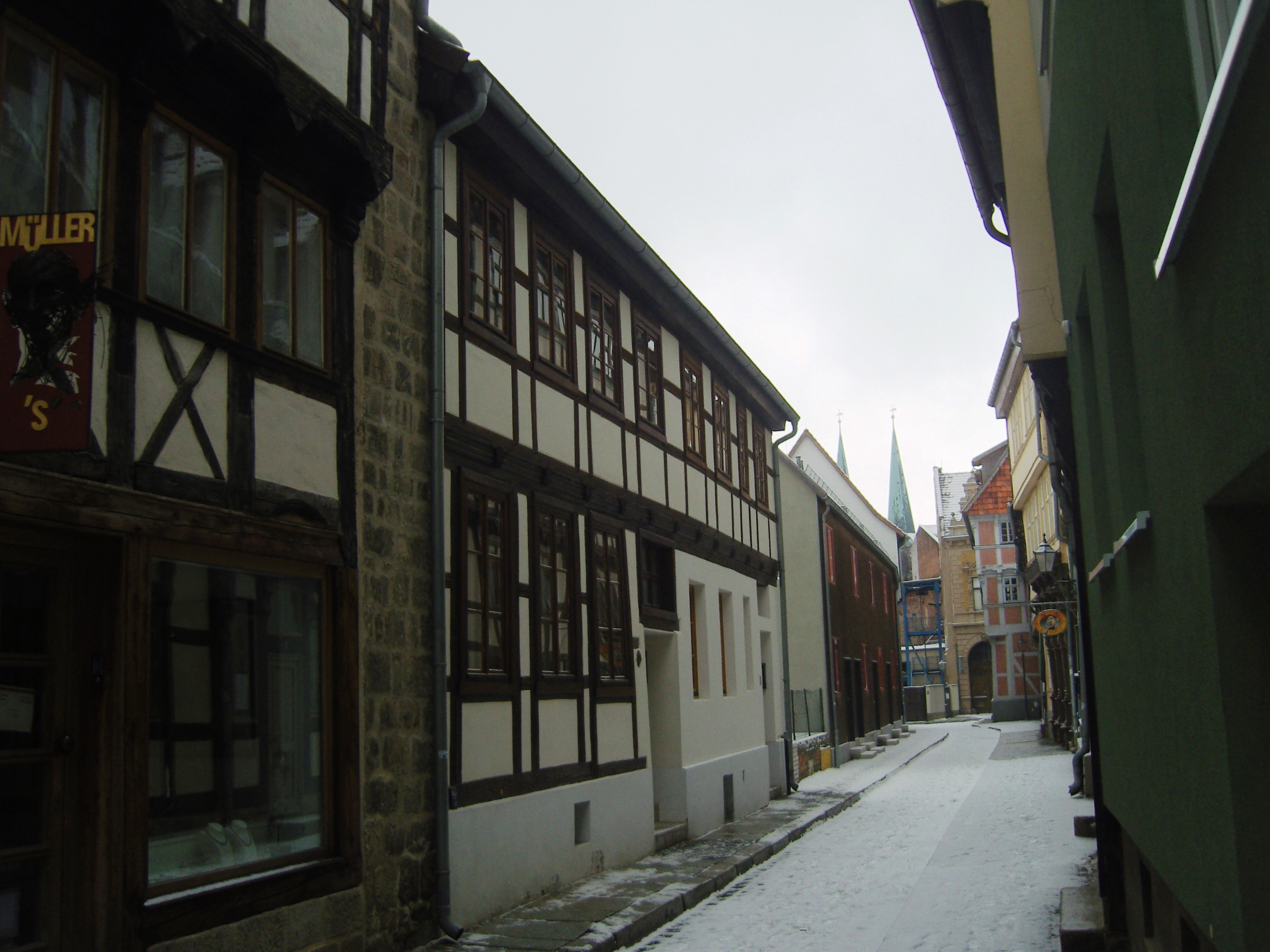 Denkmalgeschütztes Wohnhaus in der Straße Stieg 9 in Quedlinburg